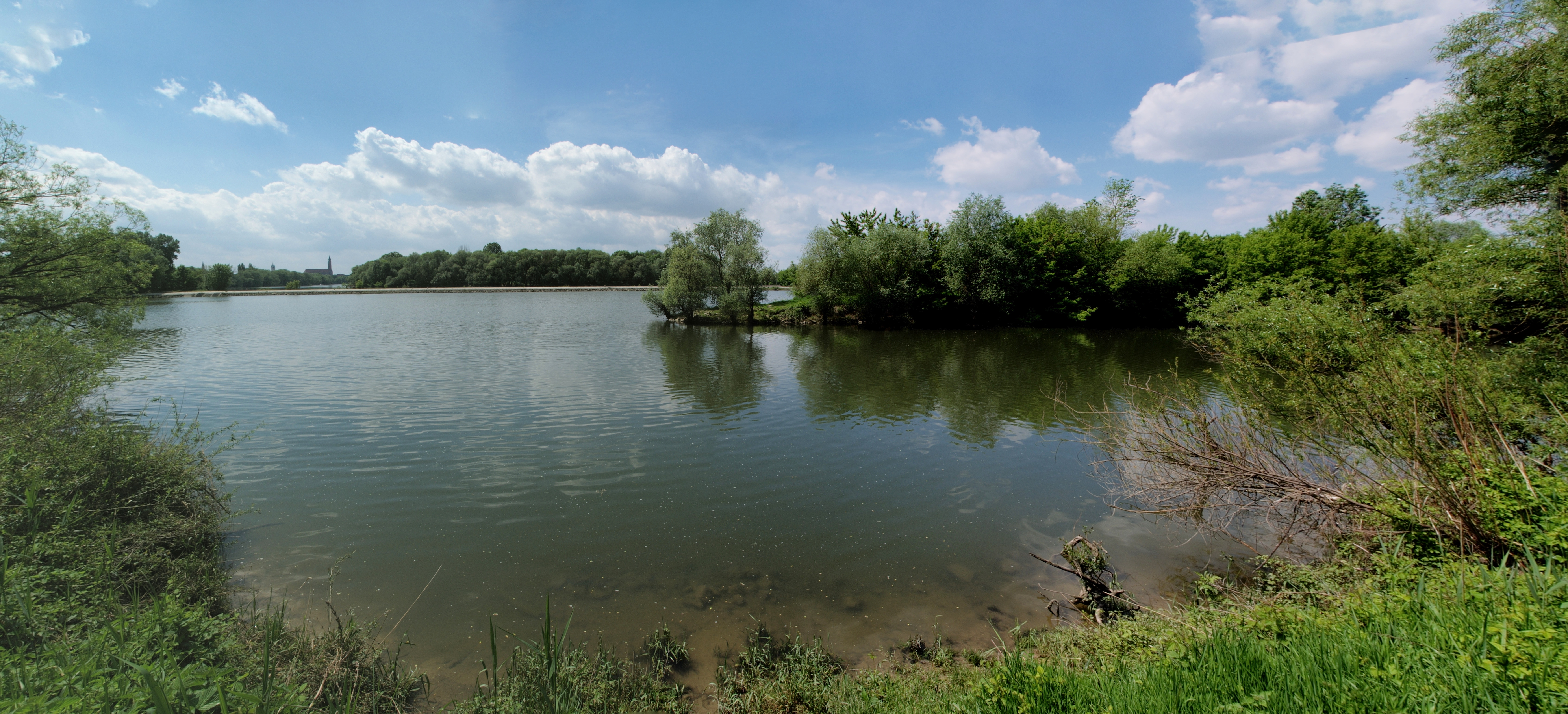 Mündung des Kößnach-Ableiters in die Alte Donau zwischen Hornstorf und Sossau